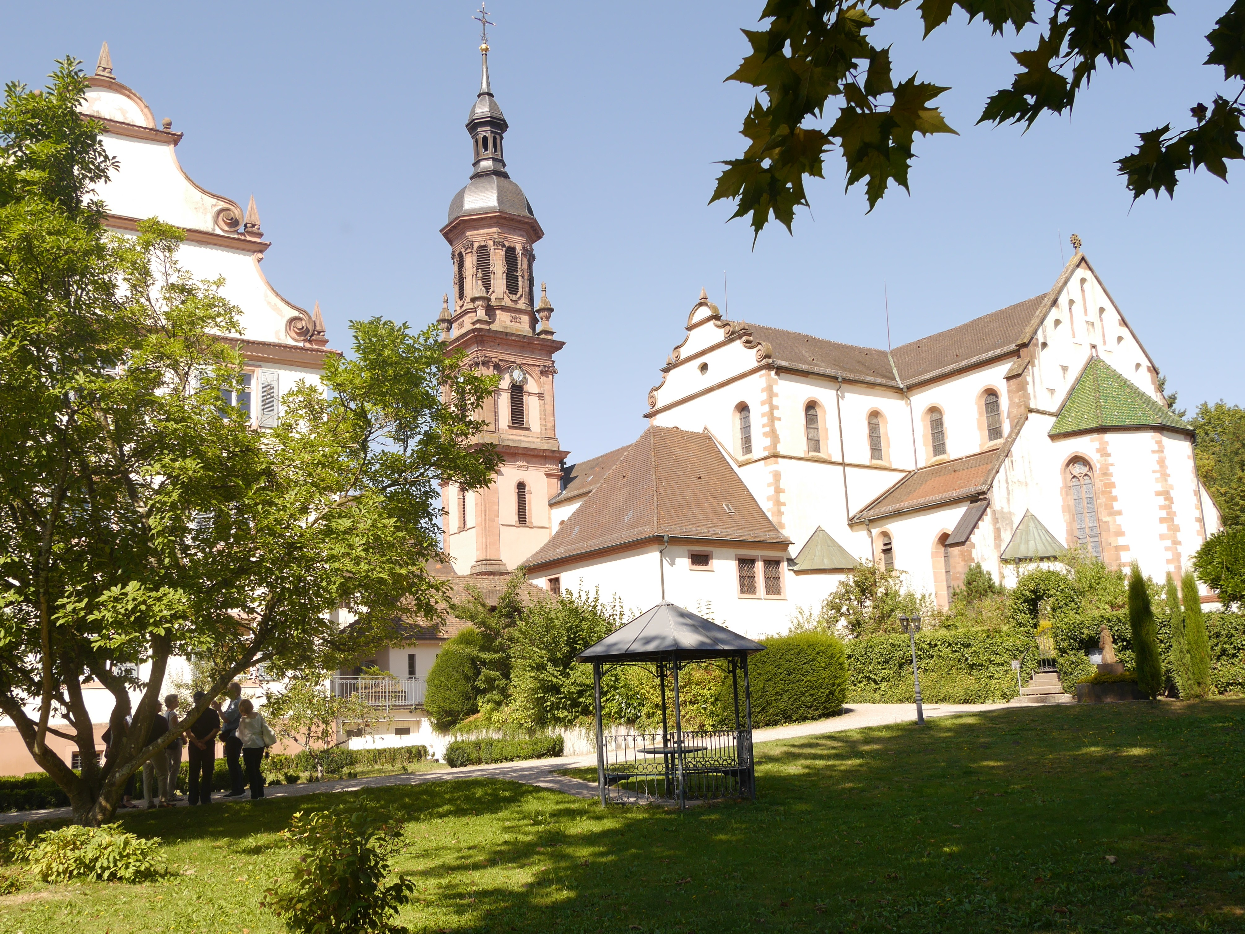 Südwestseite der Abtei in Gengenbach